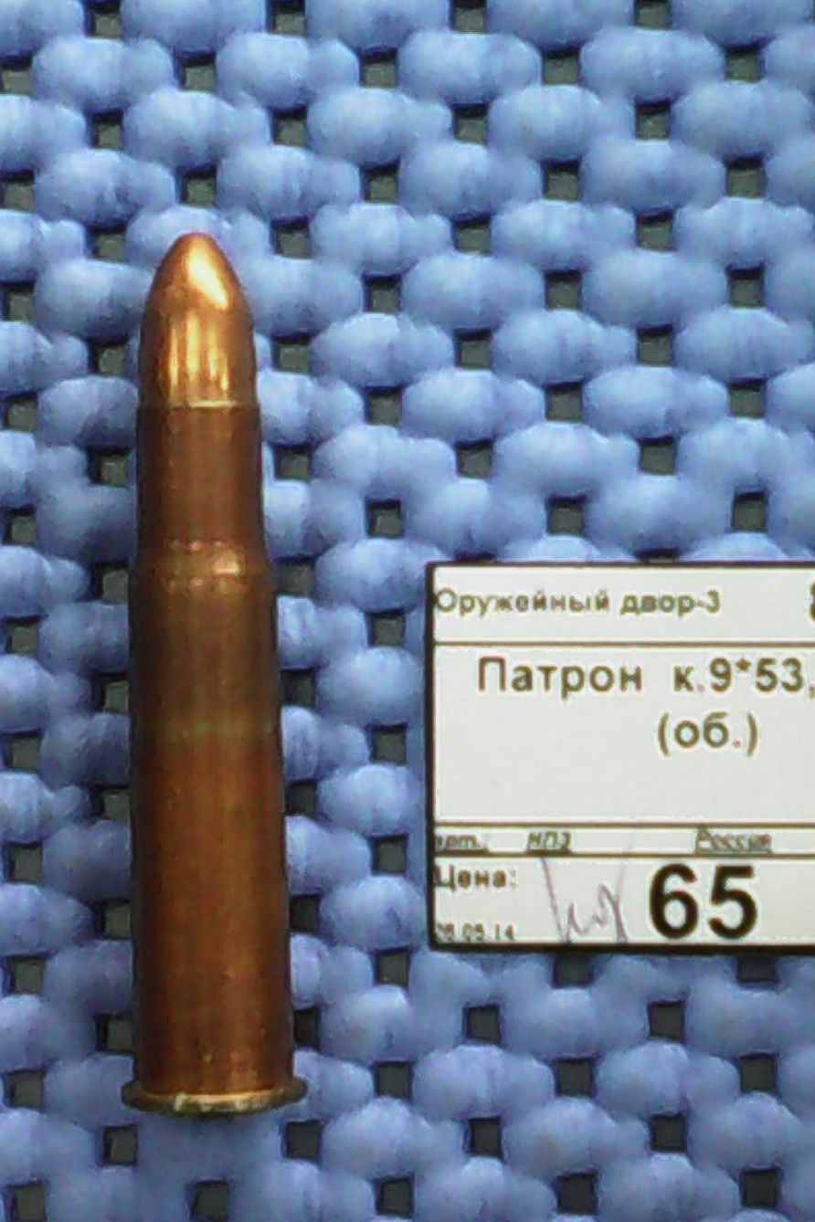 9×53R